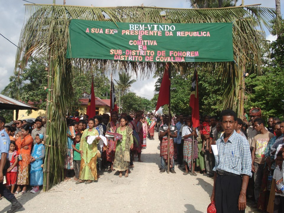 Fohoren